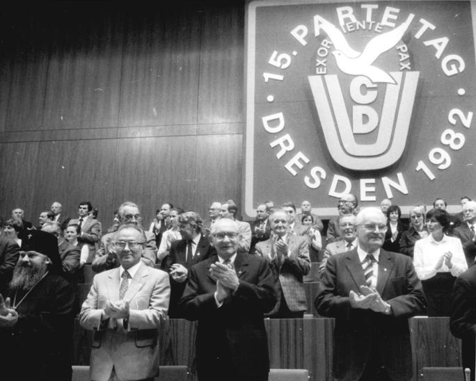 ADN-ZB/Reiche 13.10.82 Dresden: 15. Parteitag der CDU eröffnet Herzliche Begrüßung von Paul Verner - 1300 Delegierte des 15. Parteitages der CDU erörtern auf dem dreitägigen Beratungen im Kulturpalast der Elbestadt den Bündnisbeitrag der Partei für die weitere Stärkung des Sozialismus und die Sicherung des Friedens. Rechts Gerold Götting, Vorsitzender der CDU. 2.v.r. Paul Verner, Mitglied des Politbüros und Sekretär des ZK der SED. 2.v.l. Wolfgang Heyl, stellvertretender Vorsitzender der CDU. Links der Vertreter der Russisch Orthoden Kirche, Exarch Erzbischof Melchisedek